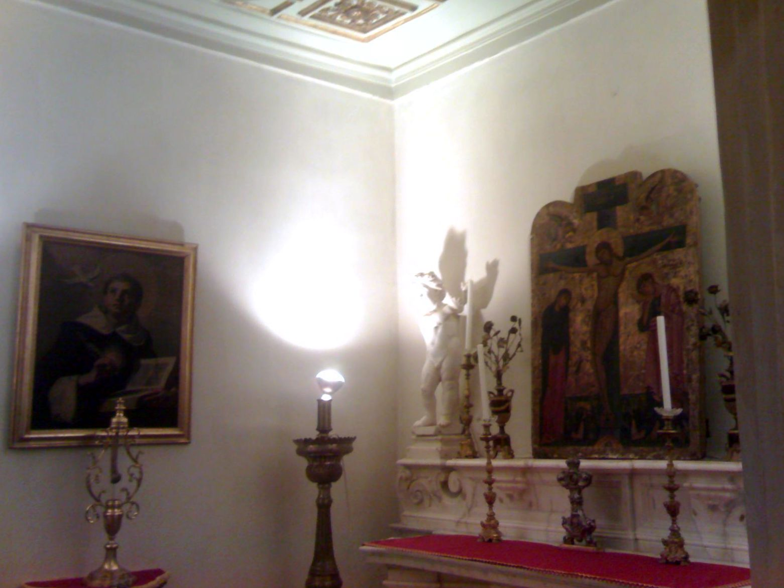 Convento di san Domenico Maggiore (Napoli) - Sala di san Tommaso d'Aquino